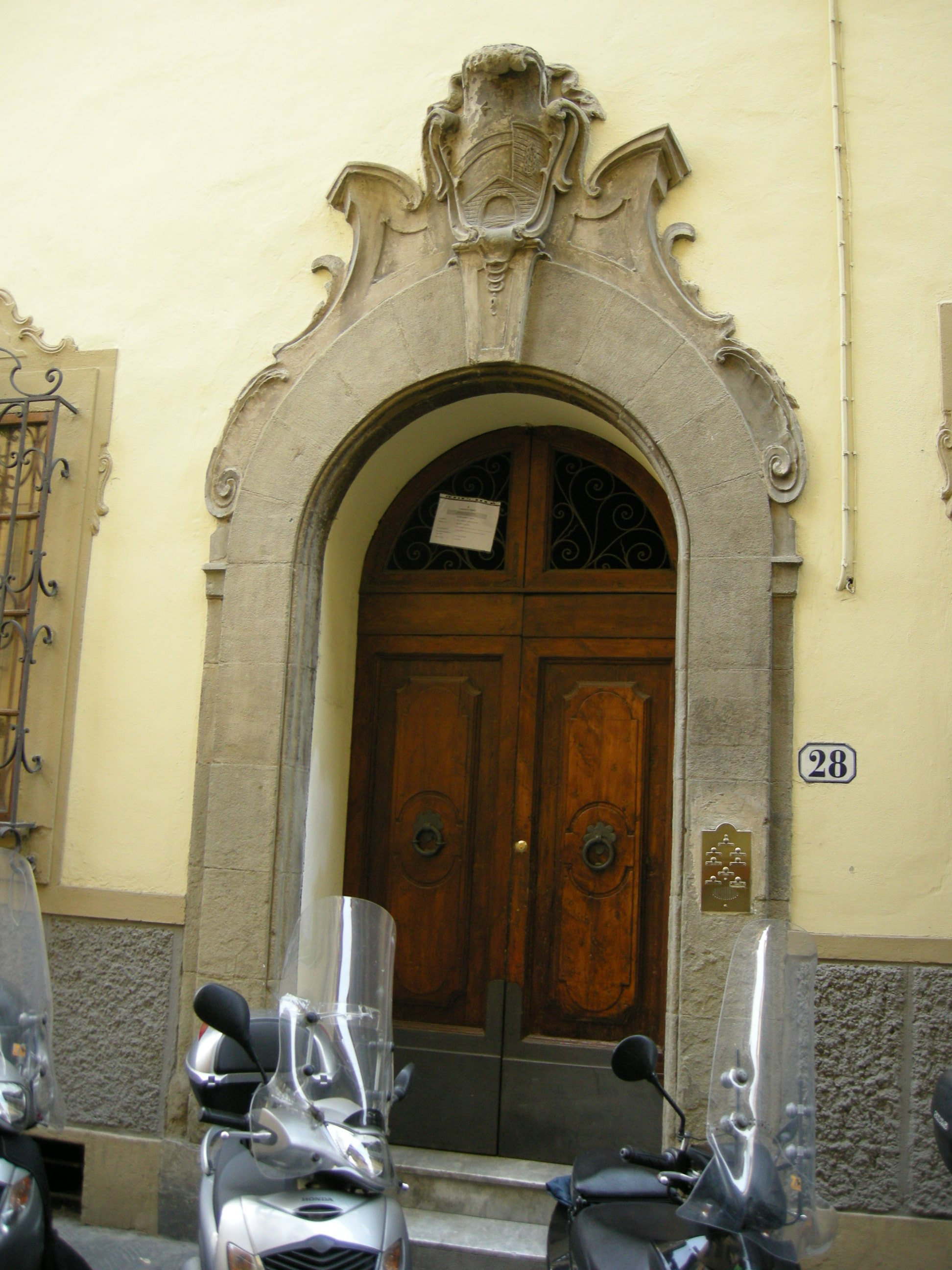 Via delle caldaie 28, palazzo rococo